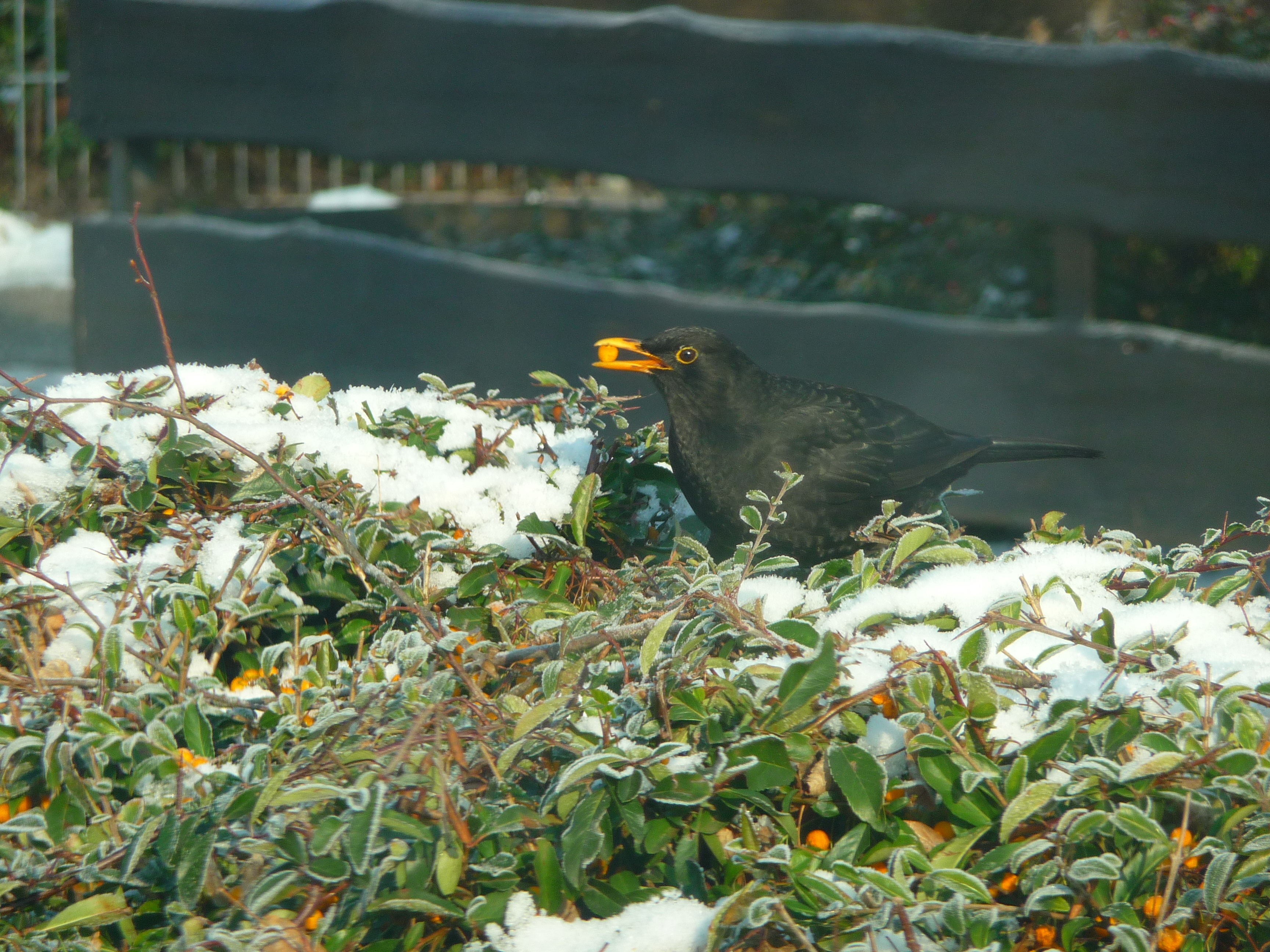 männliche Amsel beim Fressen von Beeren